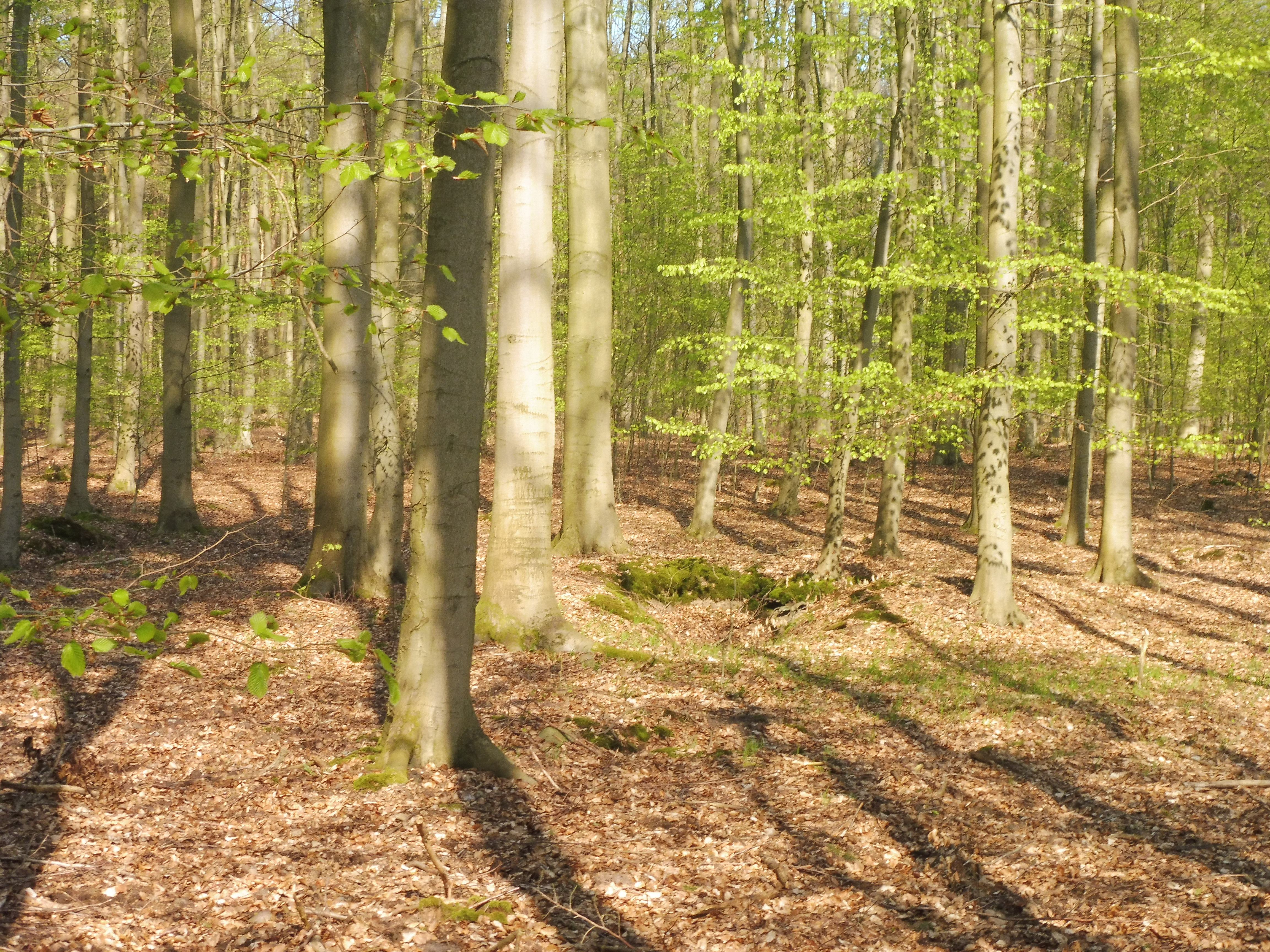 Austreibender Buchenwald bei Biestorf (Malchow)